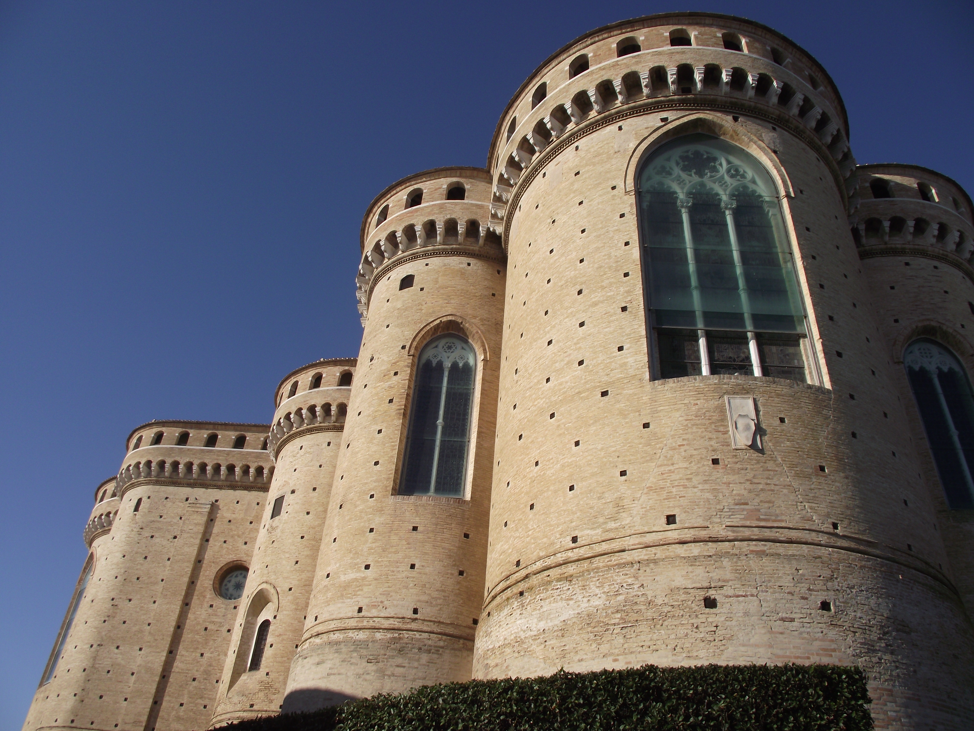 Loreto, Basilica della Santa Casa, 1468